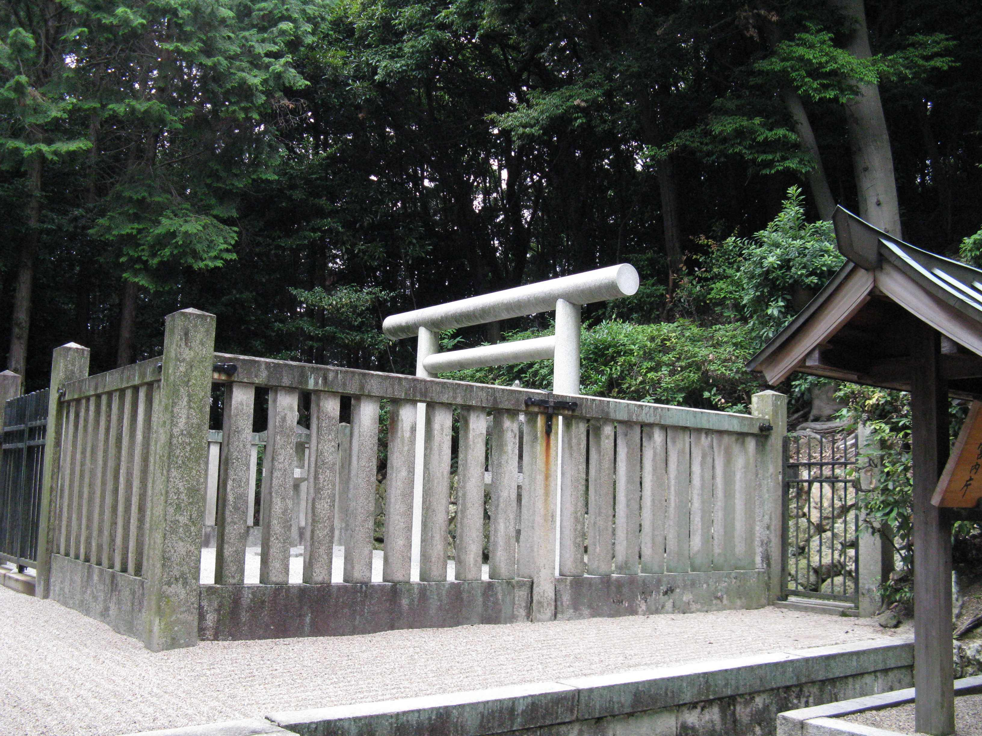 孝徳天皇大阪磯長陵